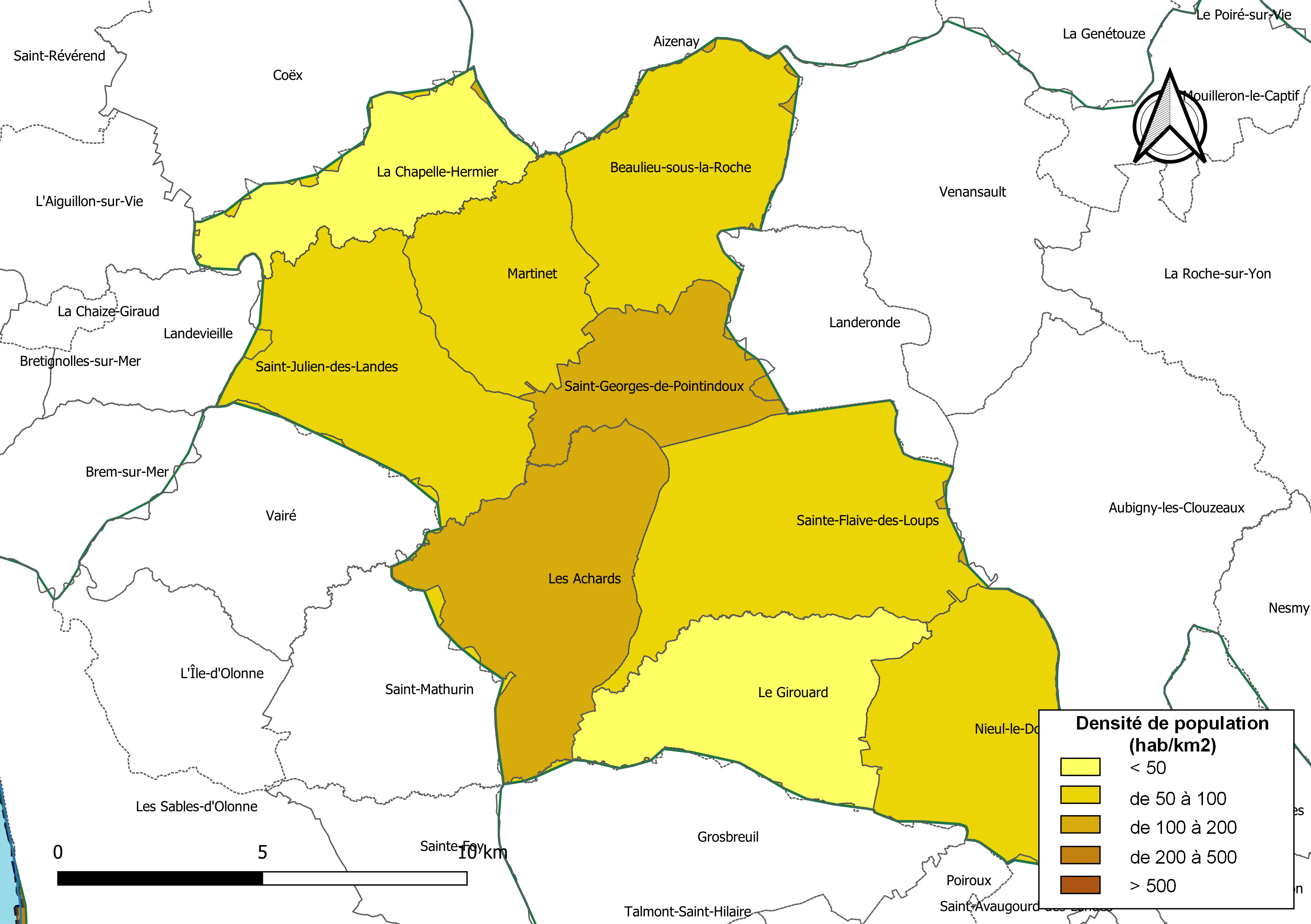 Carte des densités de population (millésimée 2016) des communes de la Communauté de communes du Pays des Achards, département de la Vendée, France. Composition au 1er janvier 2019.